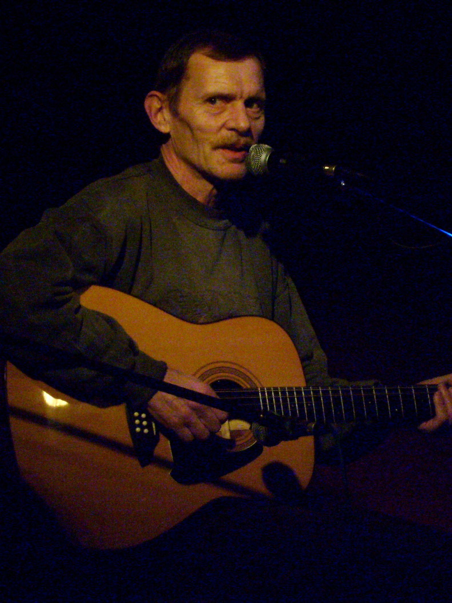 Jiří Schmitzer, český herec a písničkář, koncert v klubu Solnice, České Budějovice, Czech Republic